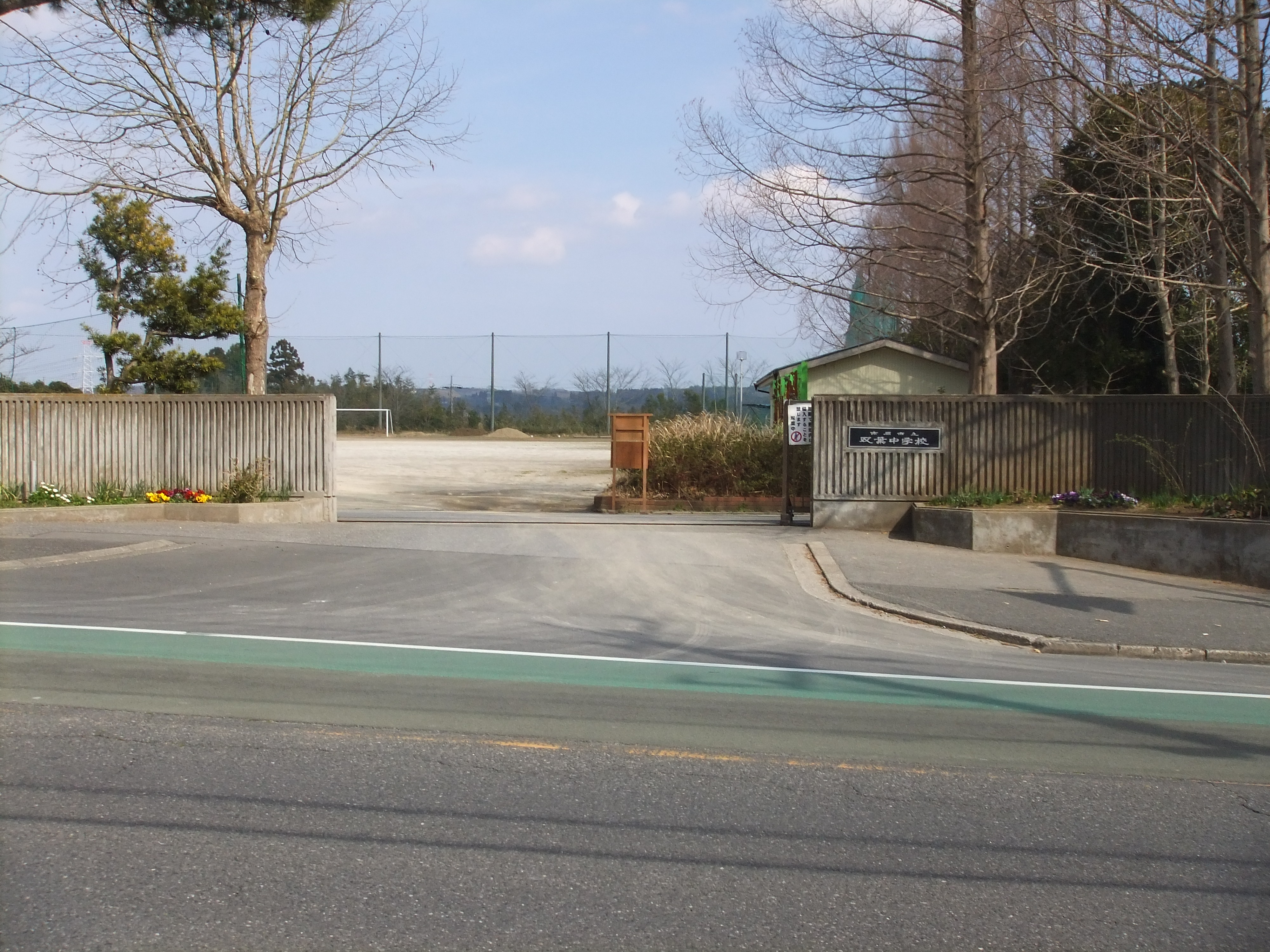 市原市立双葉中学校(2017年3月12日撮影)